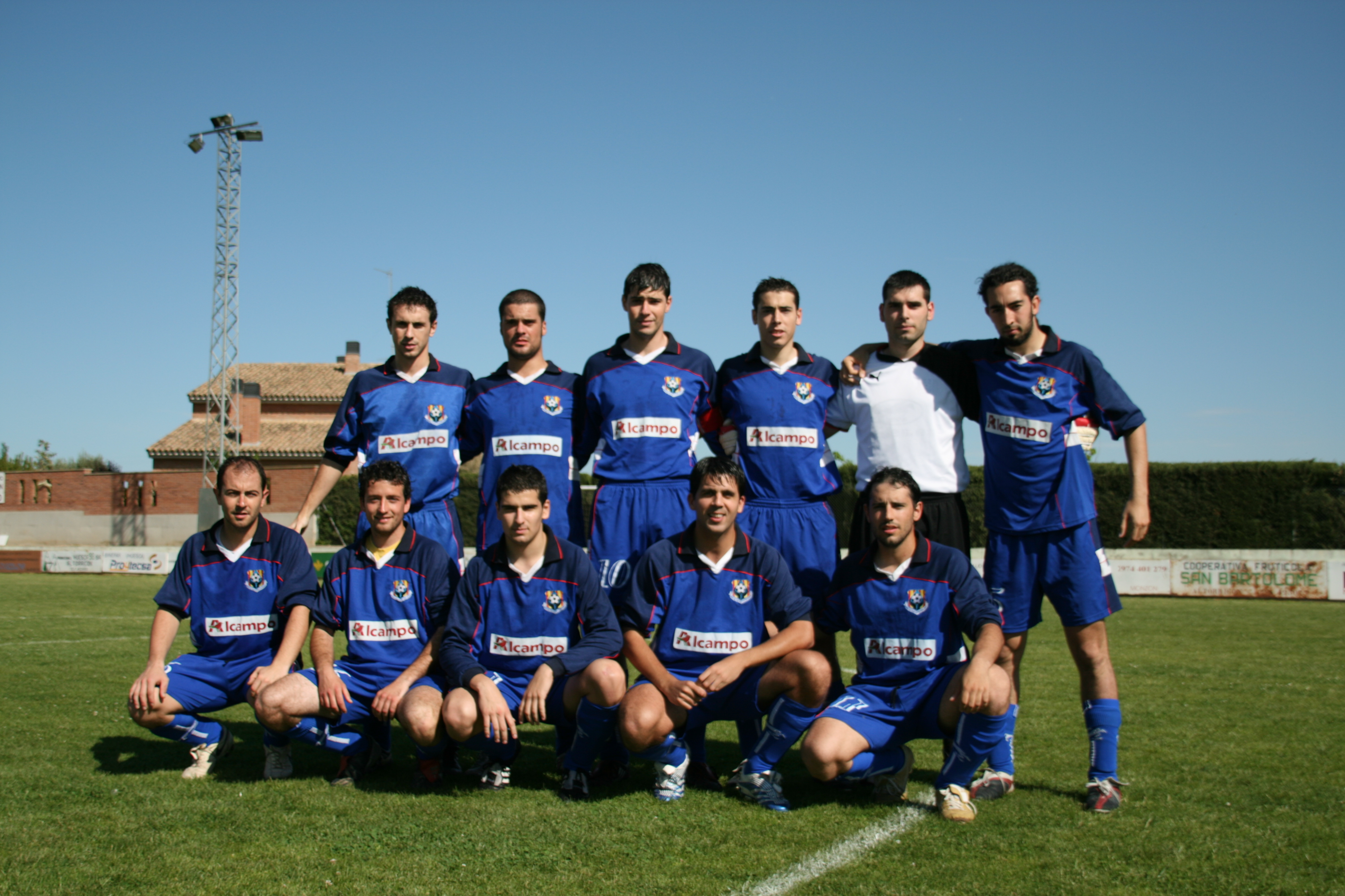 San José